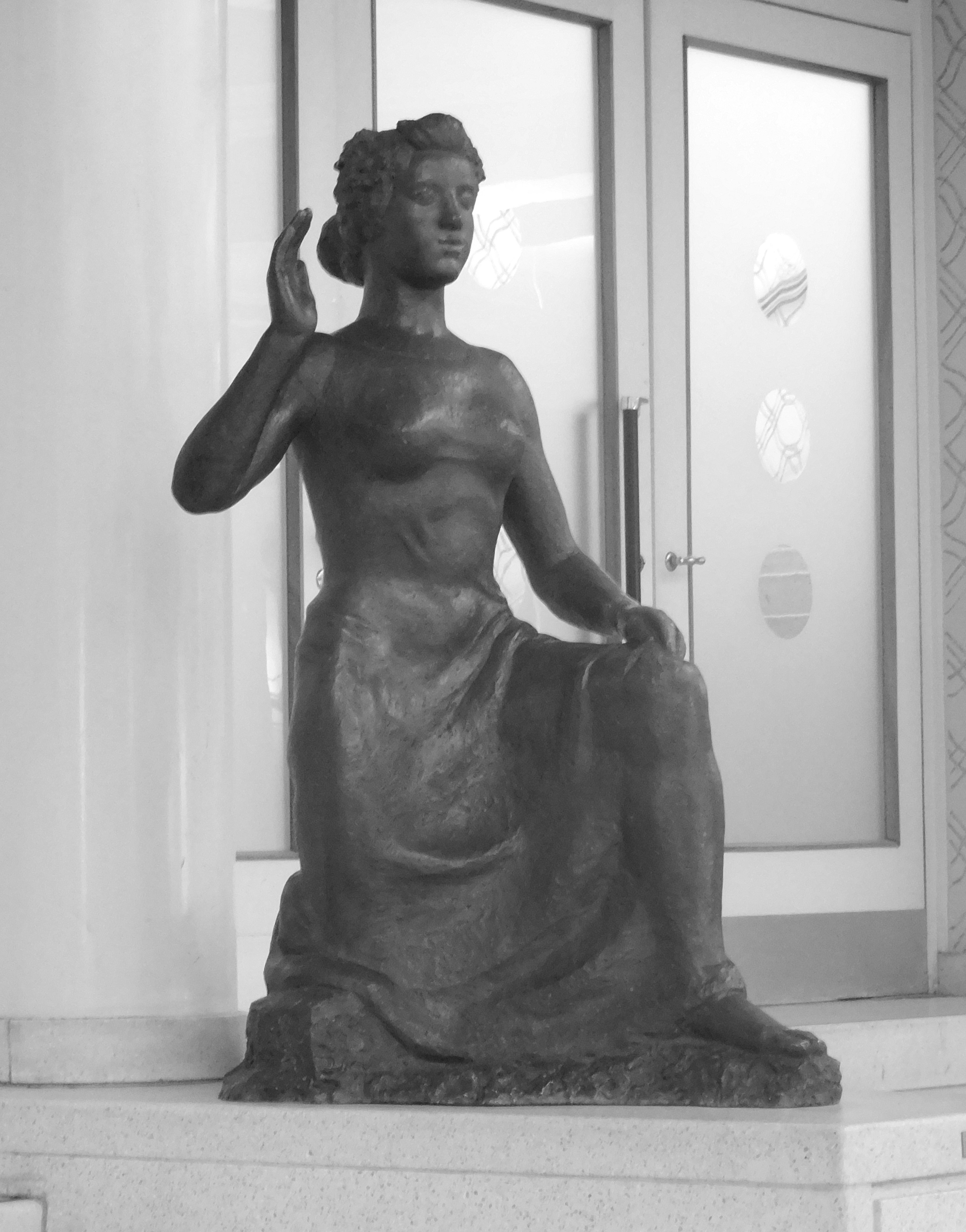 Werner F. Kunz (1896-1981): Der Klang (1954, Bronze) im Vestibül der Tonhalle Zürich; früher auch etwa "Die Lauschende" genannt